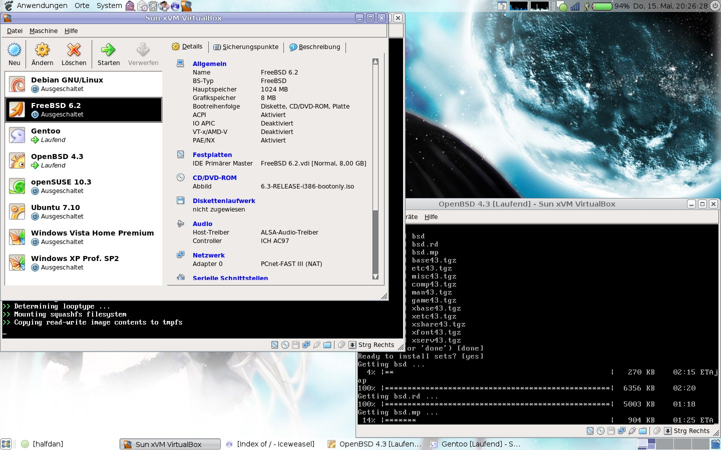 Sun xVM VirtualBox 1.6.0 in Debian lenny/sid.jpg